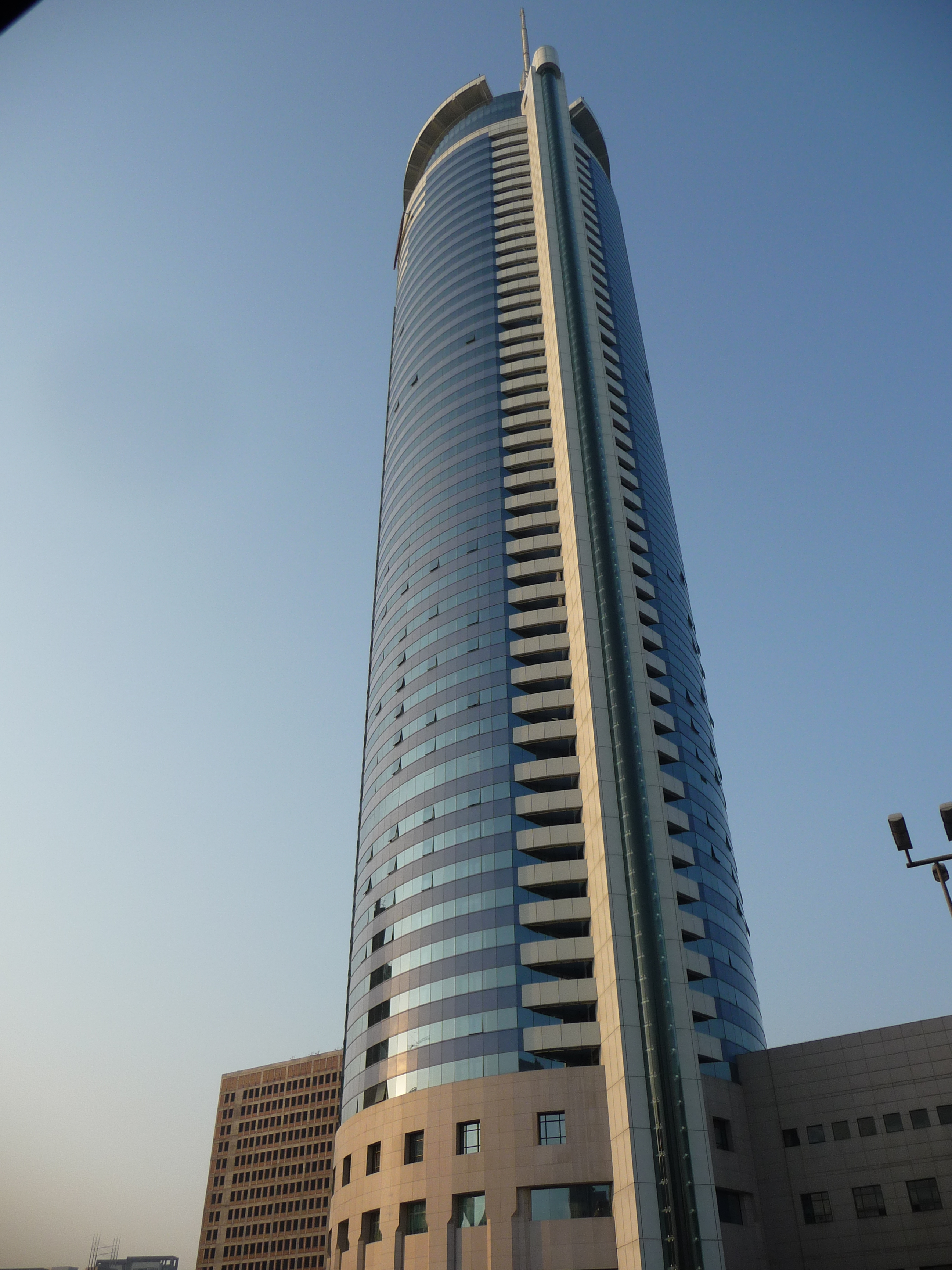 Wolkenkratzer in der westchinesischen Stadt Xi'an, Provinz Shaanxi